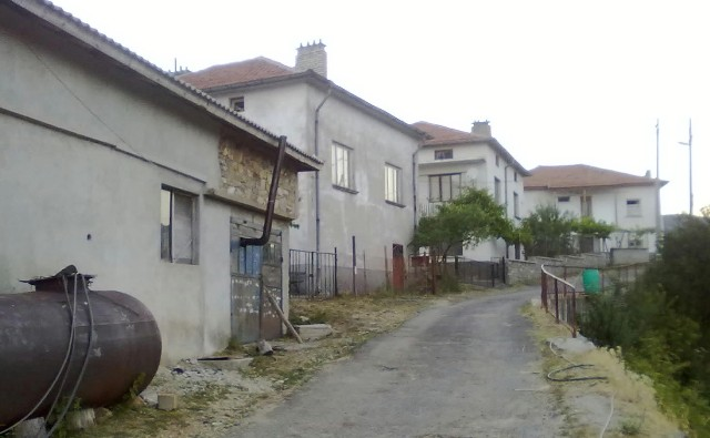 Махала Юрунце, част от село Гърнати, Област Смолян.